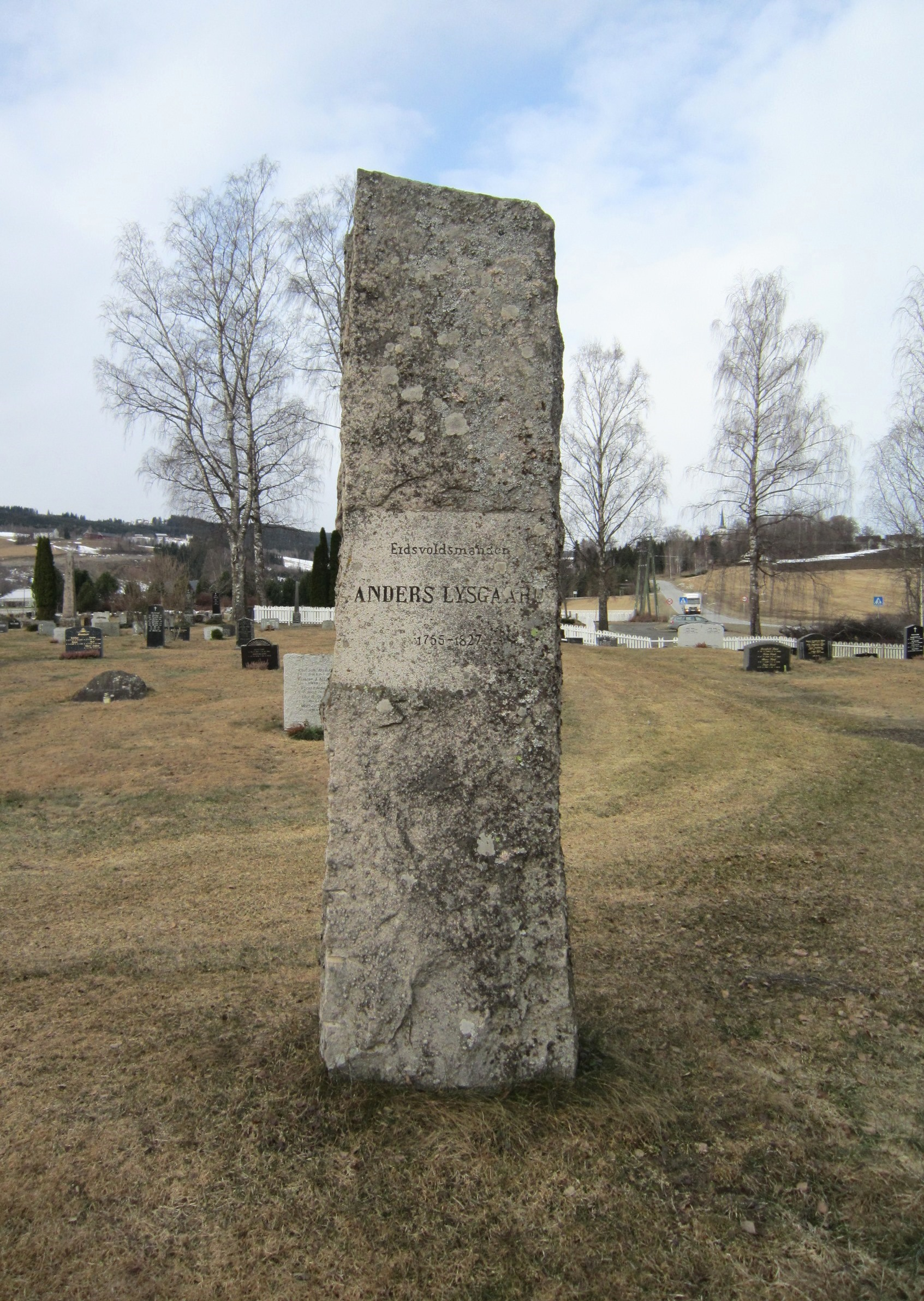 Minnebauta over Anders Lysgaard på Biri kirkegård